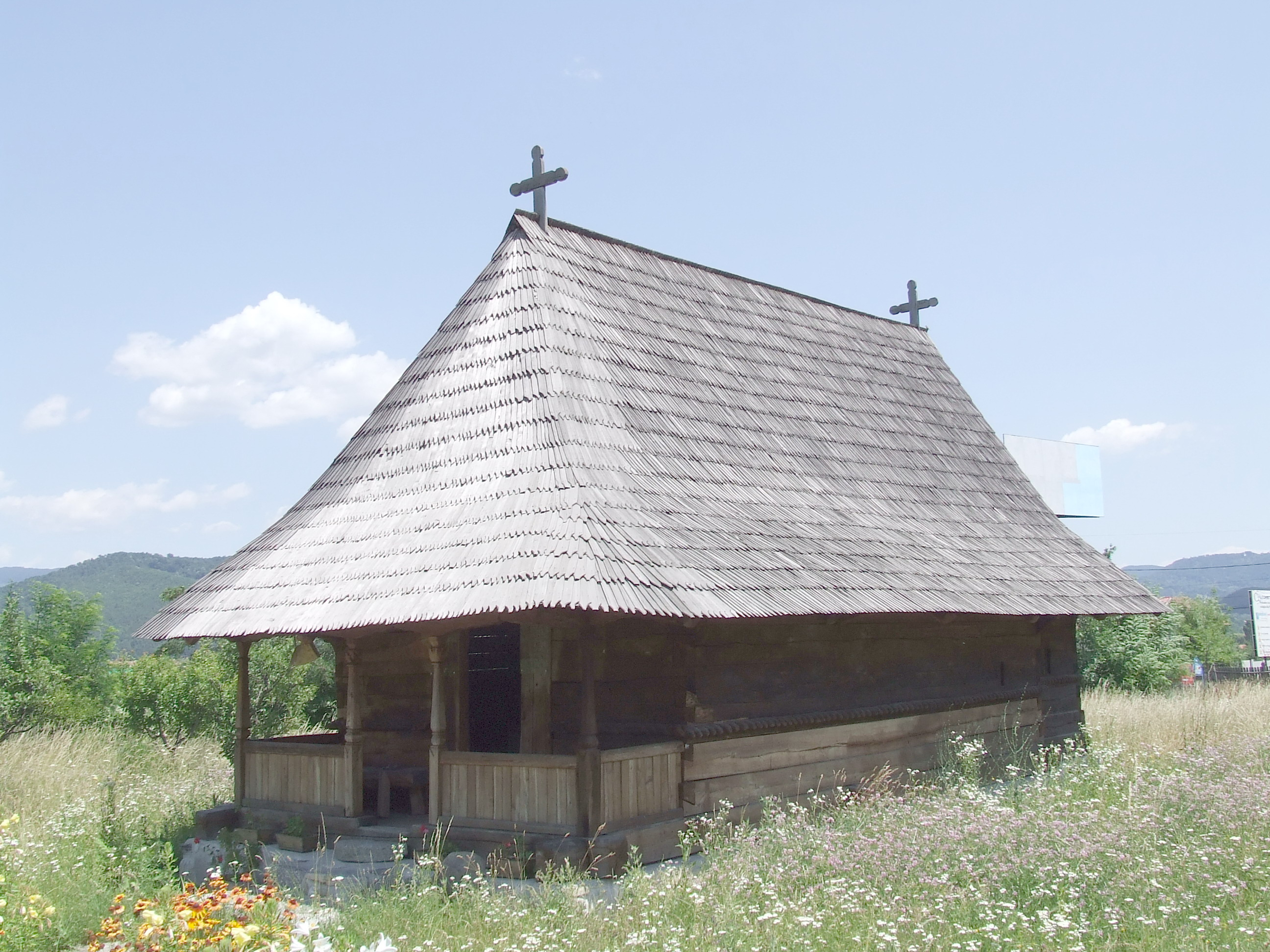 Dorfmuseum Valcea Die Holzkirche von MreneştiRomână: Muzeul Satului Vâlcean Biserica de lemn din Mrenești 03